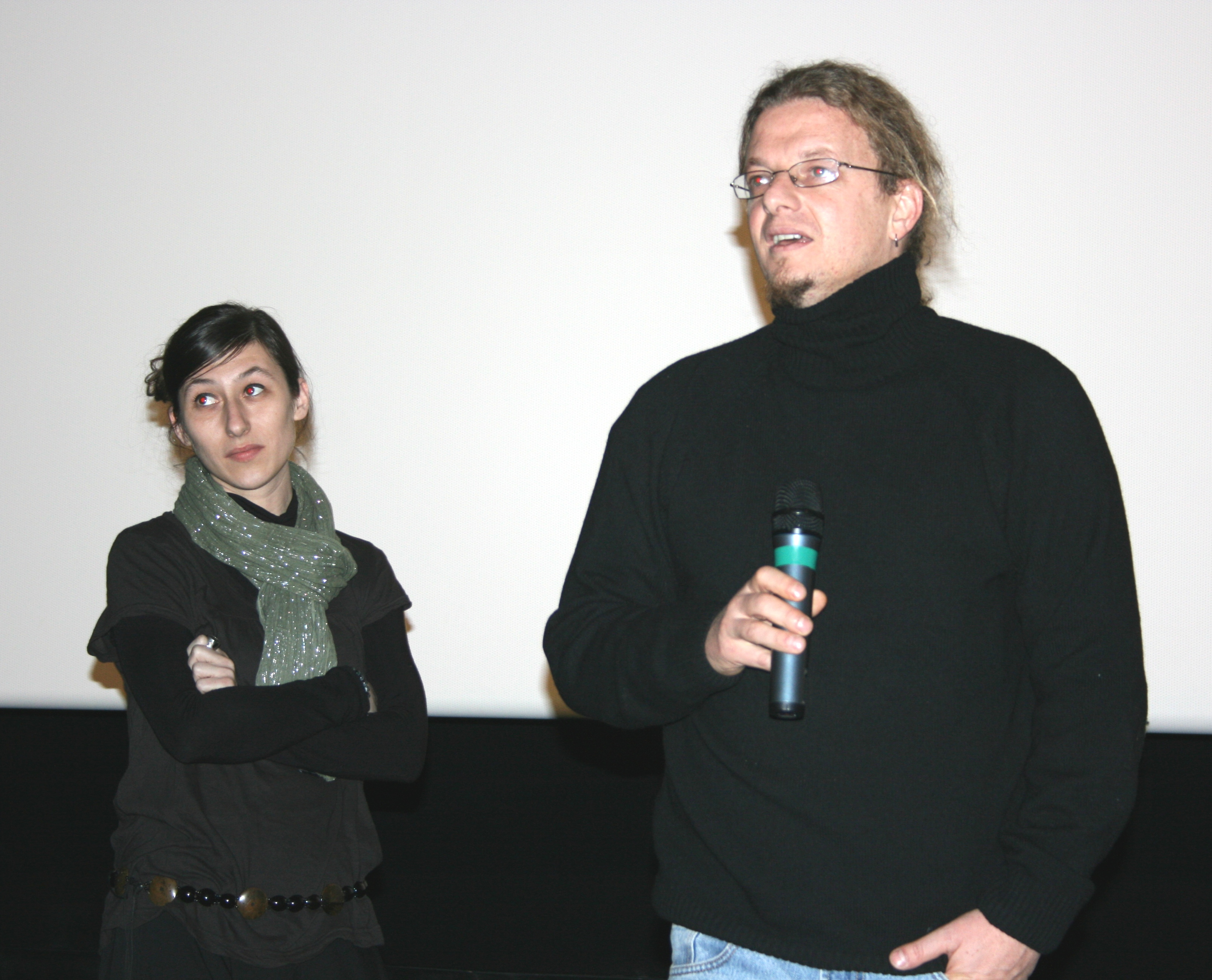 Rodrigo Plá (à droite) et son épouse (à gauche) à l'avant-première de La Zona, propriété privée diffusée à l'UGC Ciné Cité La Défense, à Puteaux.